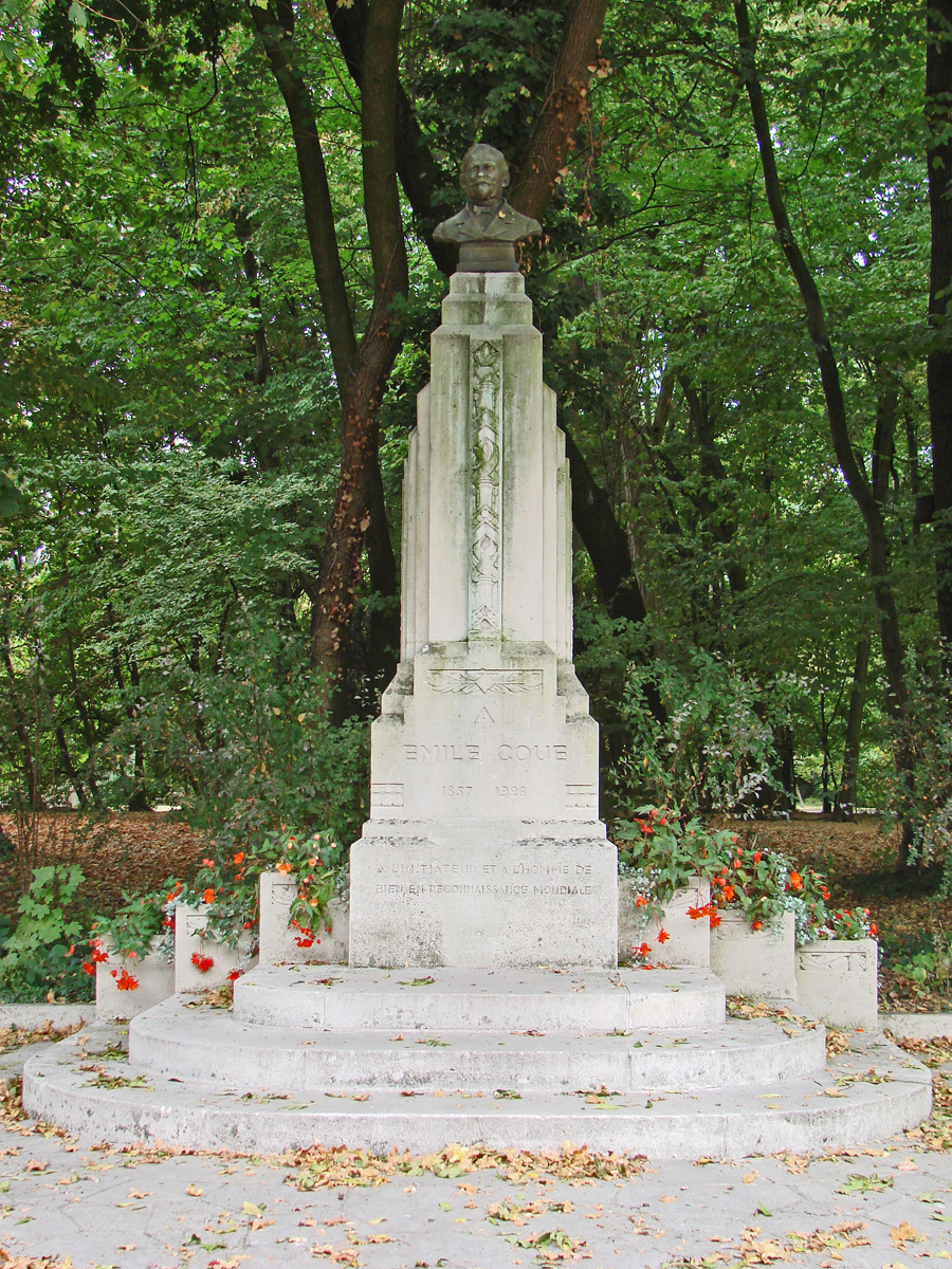 Monument à Emile Coué dans le parc Sainte-Marie. "Ce n'est pas la volonté qui nous fait agir mais l'imagination. L'autosuggestion consciente nous donne la maîtrise de nous même" Emile Coué Pharmacien et psychothérapeute français, né à Troyes en 1857, mort à Nancy en 1926. Connu dans le monde entier pour sa méthode de guérison par autosuggestion qui porte son nom, il s'installe à Nancy comme psychologue et psychothérapeute de 1902 à 1925.